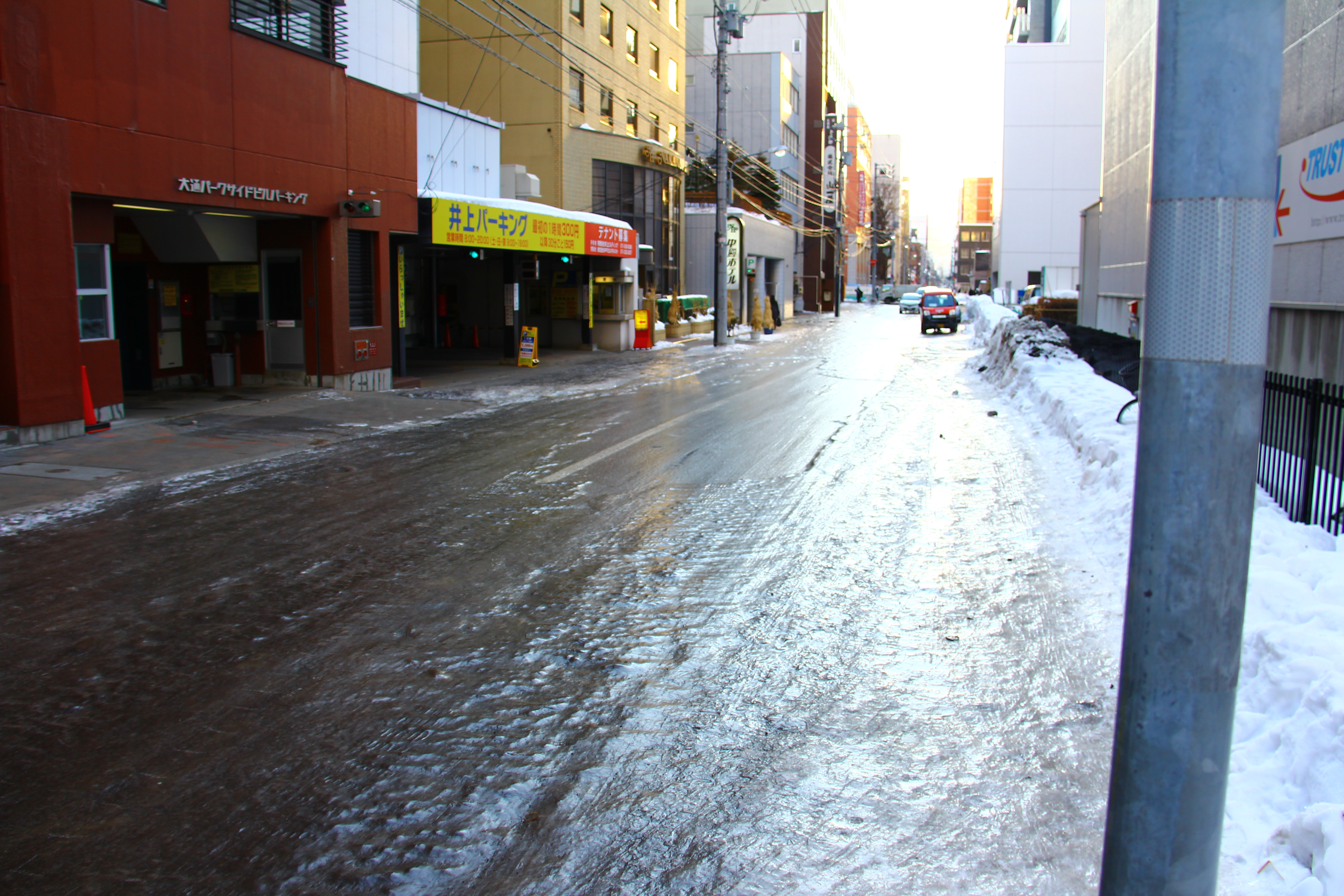 Sim.. é gelo.. liso e escorregadio... Isso na calçada e ruas... Carros andam nisso!! acredite se quiser!